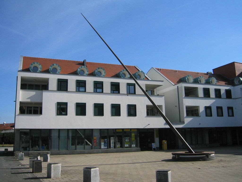 Horizontalsonnenuhr in Amtzell selbst fotografiert am 20. Februar 2007